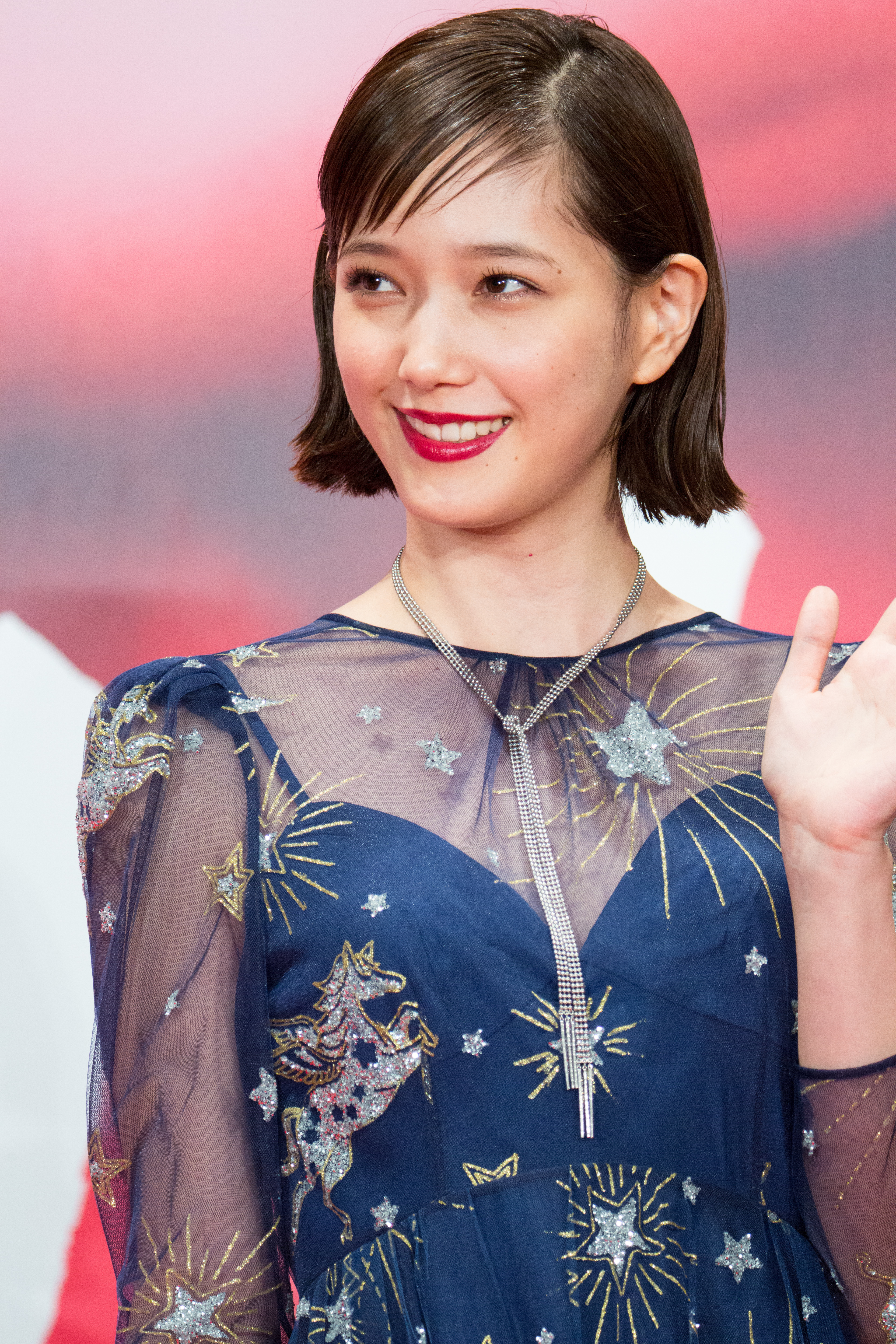 第30回 東京国際映画祭 オープニングセレモニー 本田翼 (鋼の錬金術師)